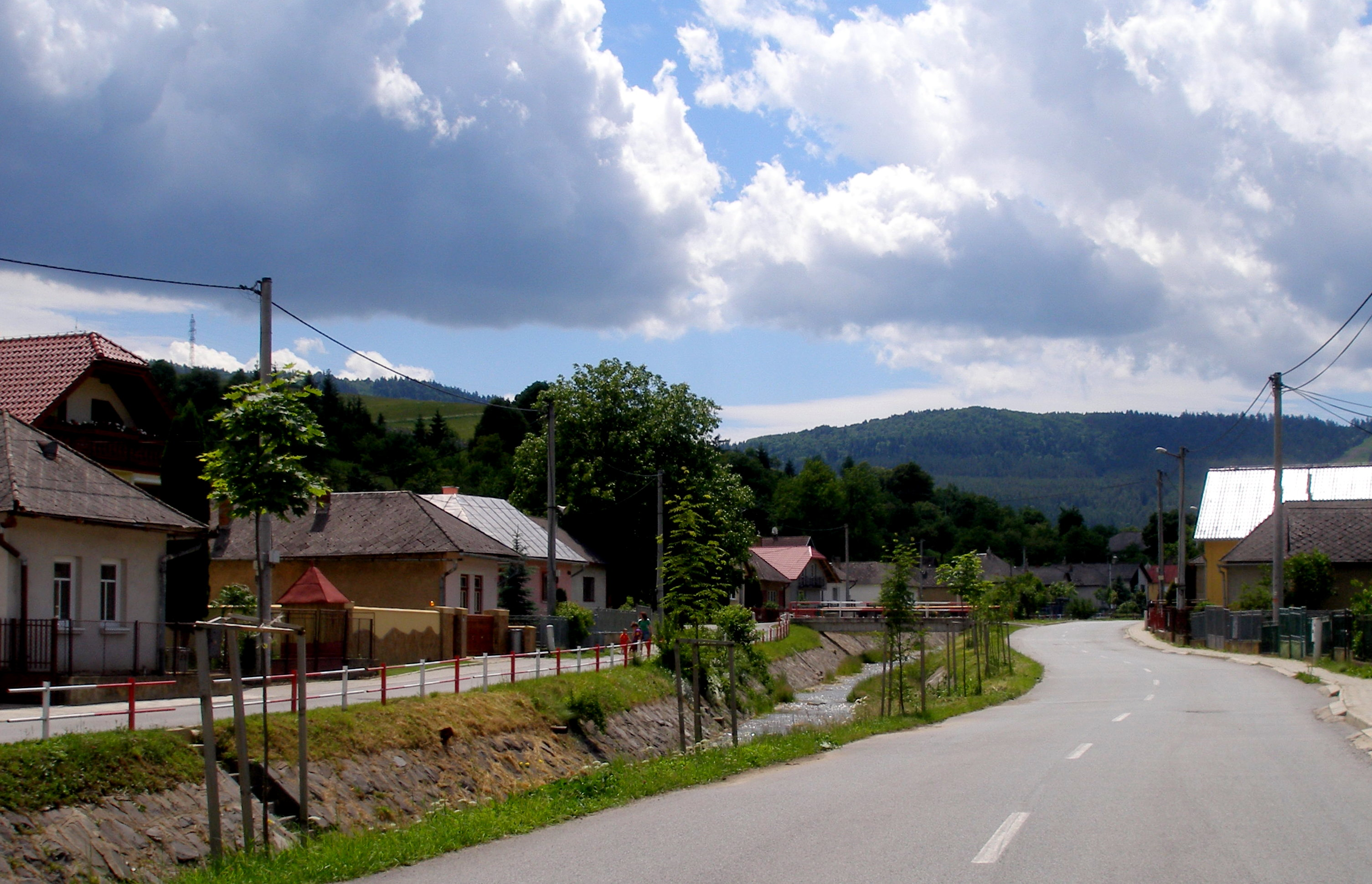 Obec Dubovica okres Sabinov